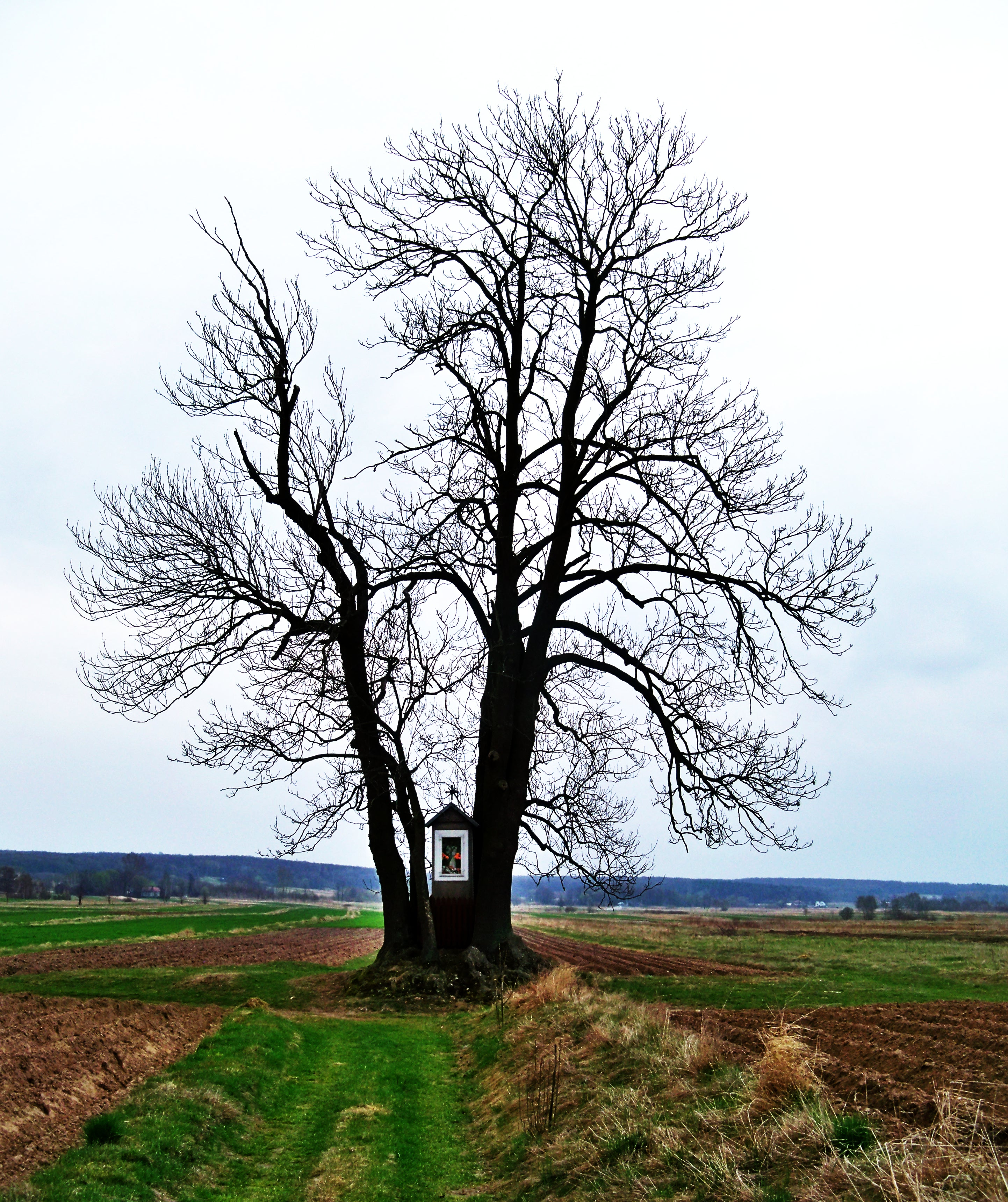 Kapliczka przy śródpolnej drodze w Trzebosi Dolnej